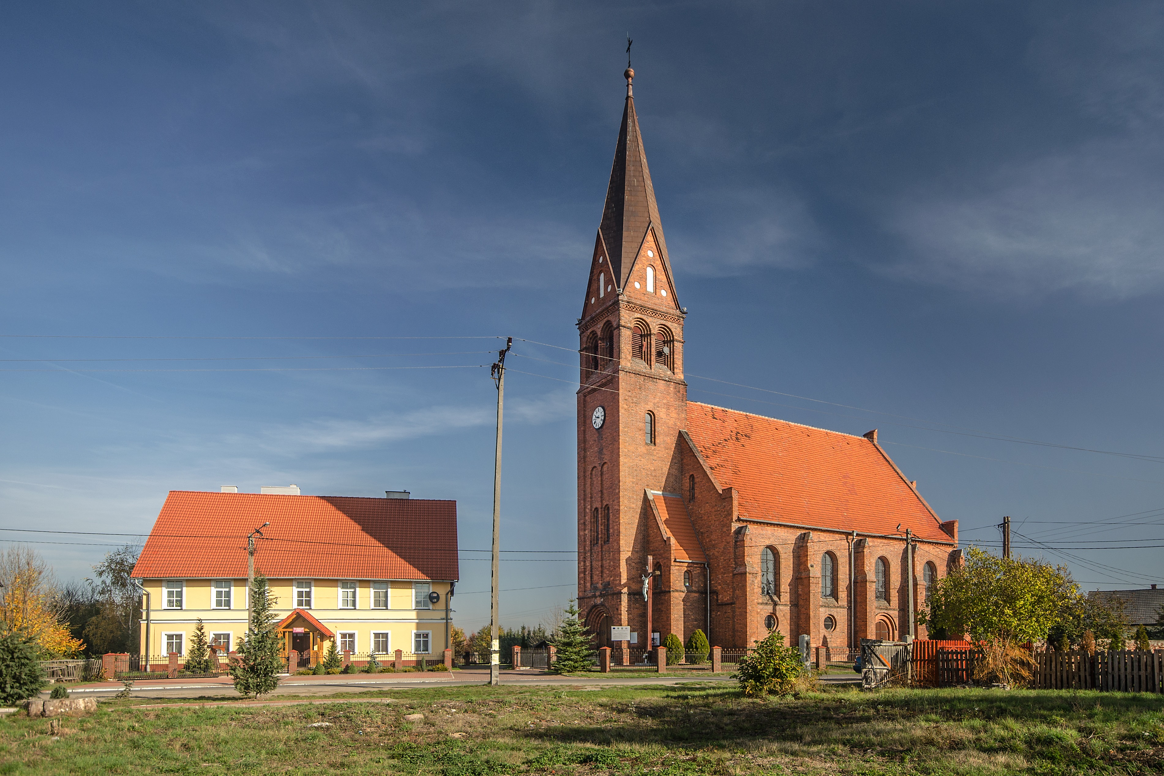 Szydłowice, gmina Lubsza, powiat brzeski, woj. opolskie - kościół św. Bartłomieja